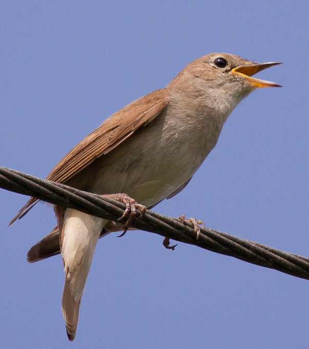 Singende Nachtigall auf Stromdraht im Naturschutzgebiet Bislicher Insel in NRW, Deutschland